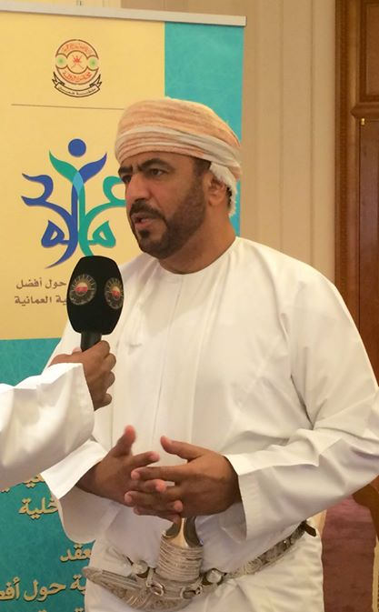 اللجنة الوطنية حول افضل الممارسات العمانية